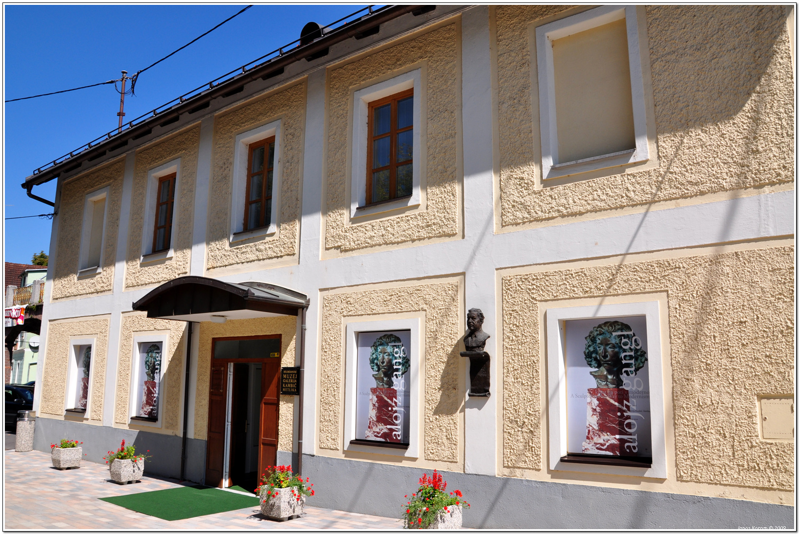 Metlika (2)